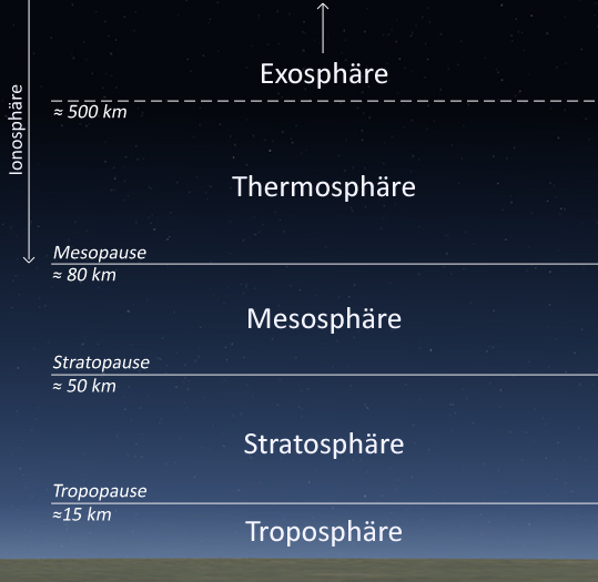 Aufbau der Erdatmosphäre (Europa, Sommer)